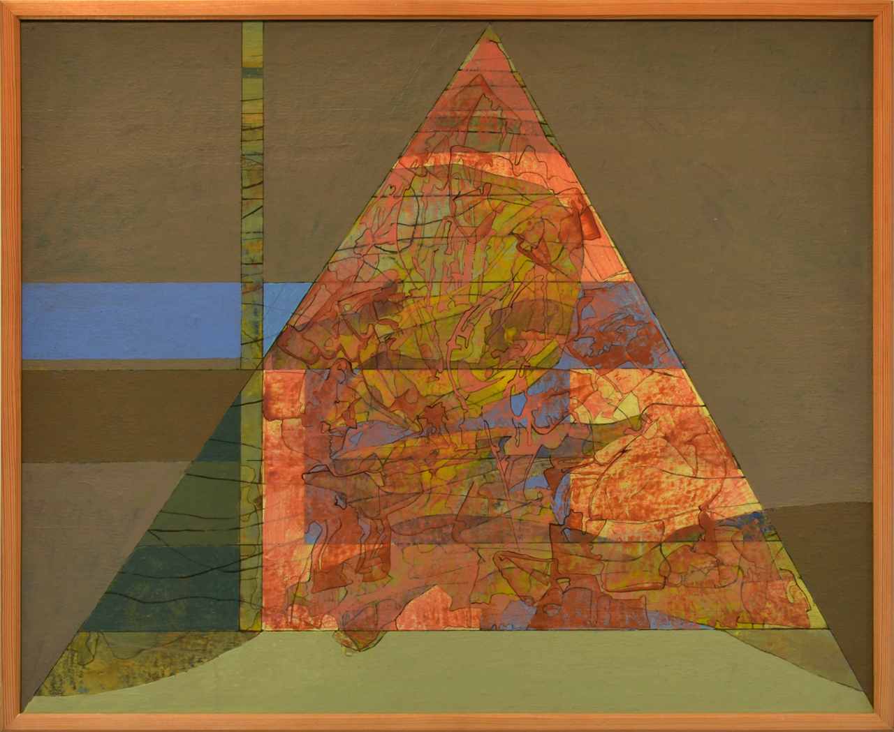 Jiří Mrázek, Pyramida, olej, plátno, 65x85 cm, 1981